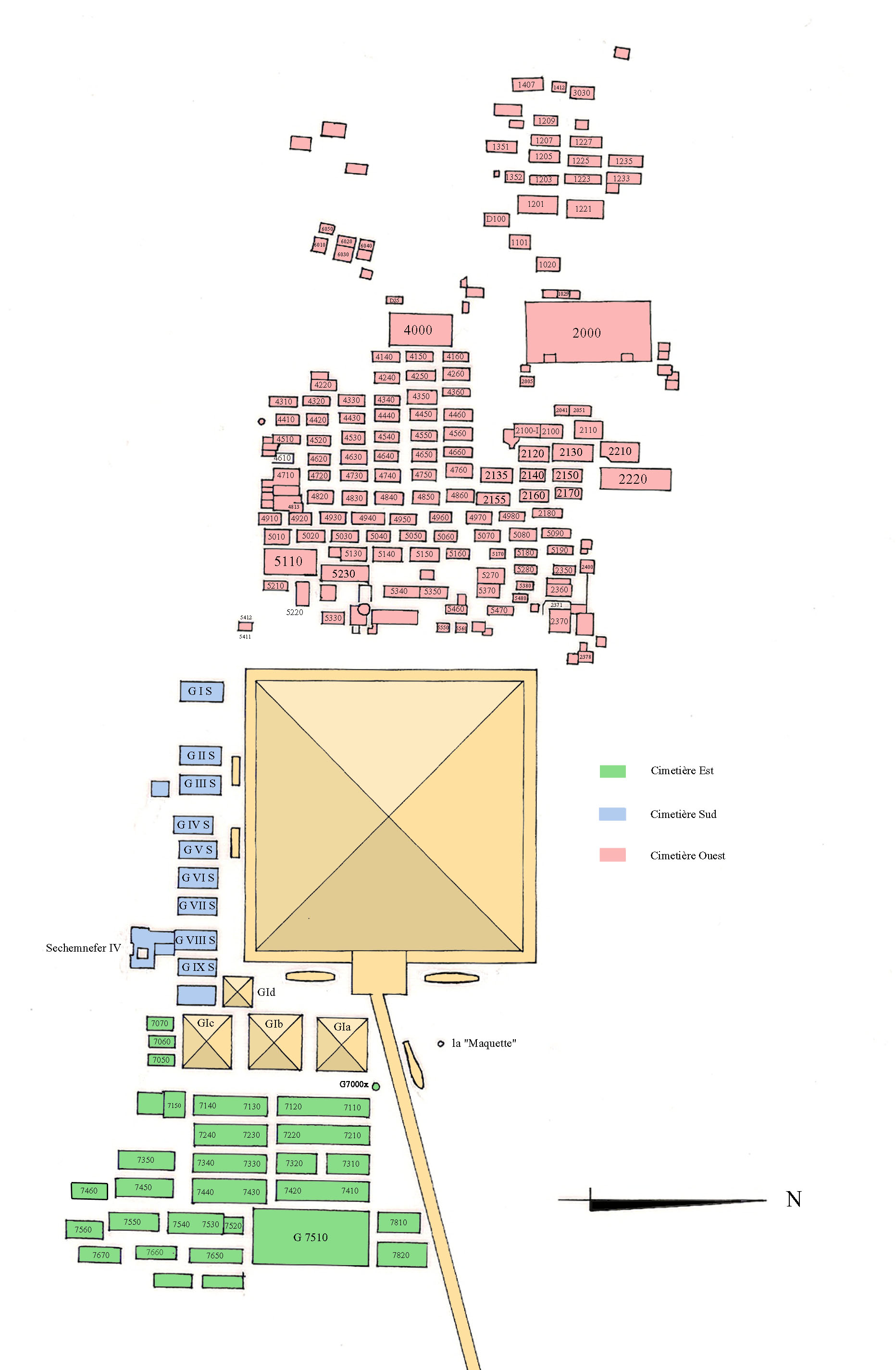 Carte de la nécropole du complexe de Khéops à Gizeh